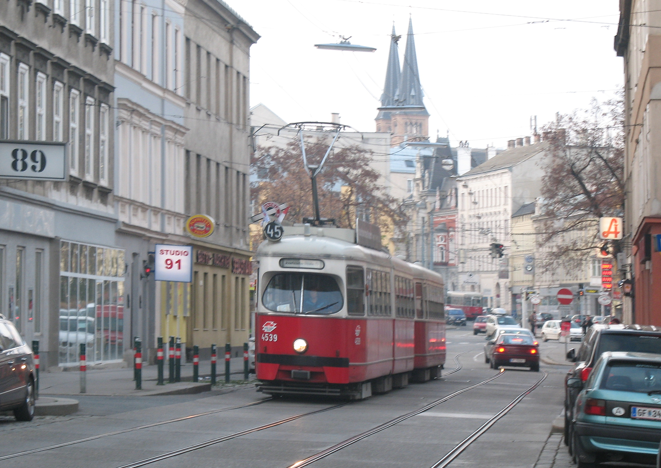 Temporäre Straßenbahnlinie 45, Ottakringer Straße, Erdbrustgasse – Josefstädter Straße UEsperanto: Nedaŭra tramlinio 45, Ottakringer Straße, Erdbrustgasse – Josefstädter Straße U